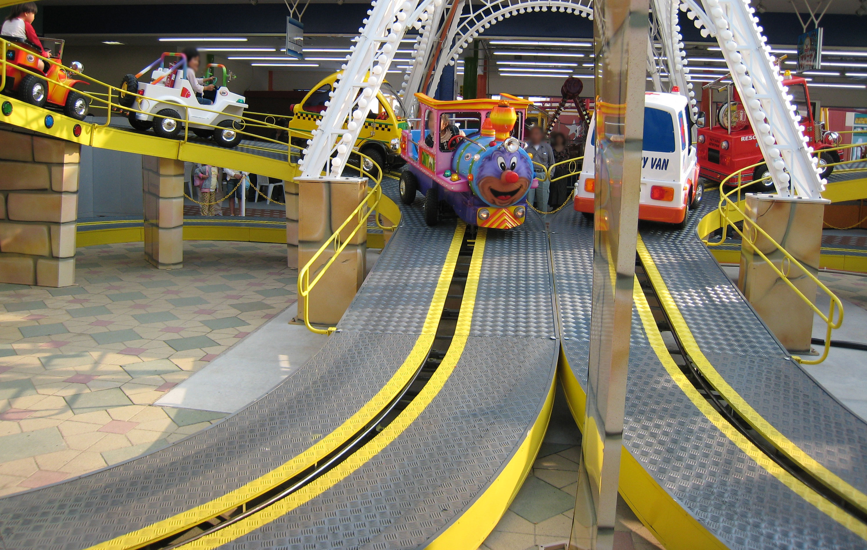 ツアードパリ：マリーナホップ内マリーナサーカス